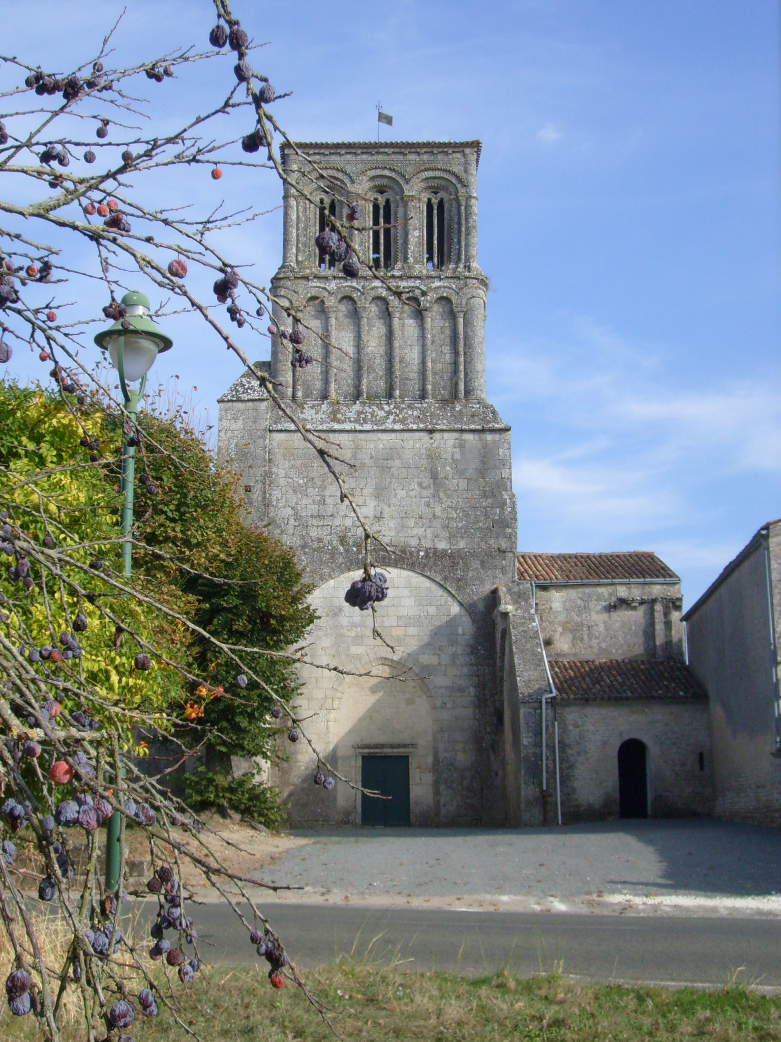 L'église romane de Thézac